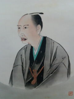 大沼枕山の肖像